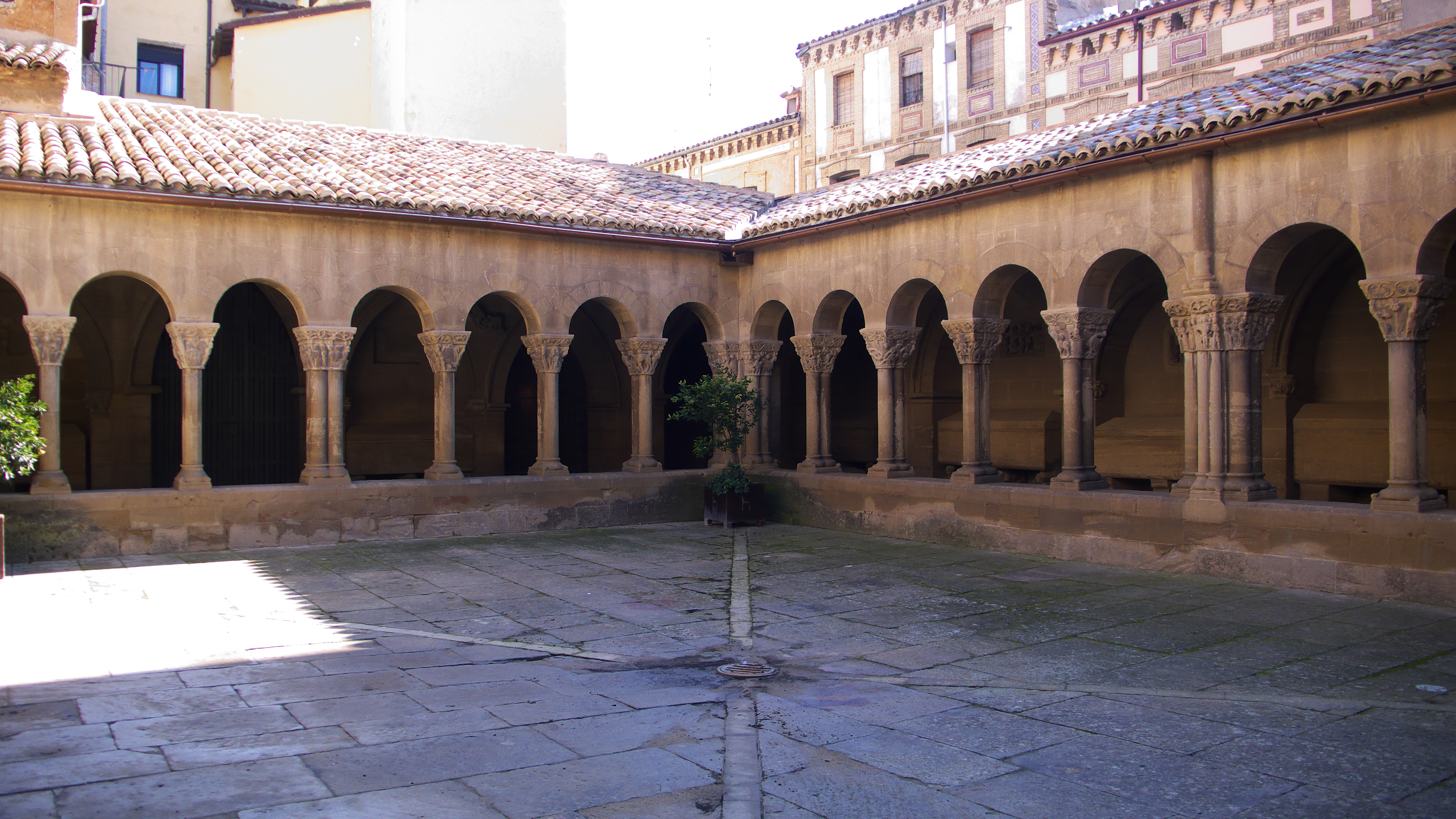 En este claustro, centro de las meditaciones de Ramiro II, monje-rey, podemos contemplar dieciocho capiteles del siglo XII, del total de treinta y ocho.